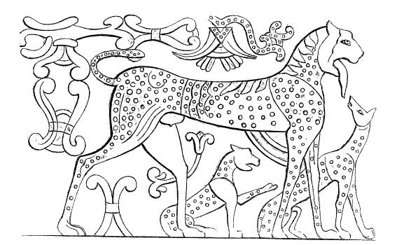 Dessin fresques Tombe Campana